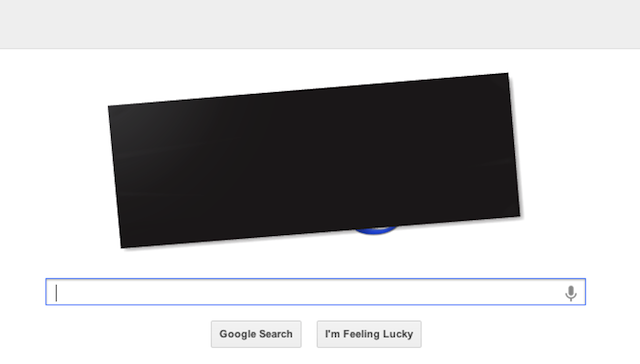 اعتراض جوجل على قانون sopa